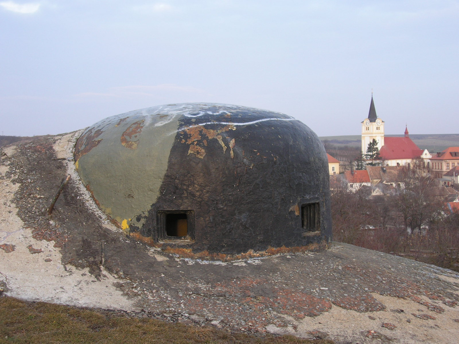 Izolovaný pěchotní srub MJ-S 2, levý zvon